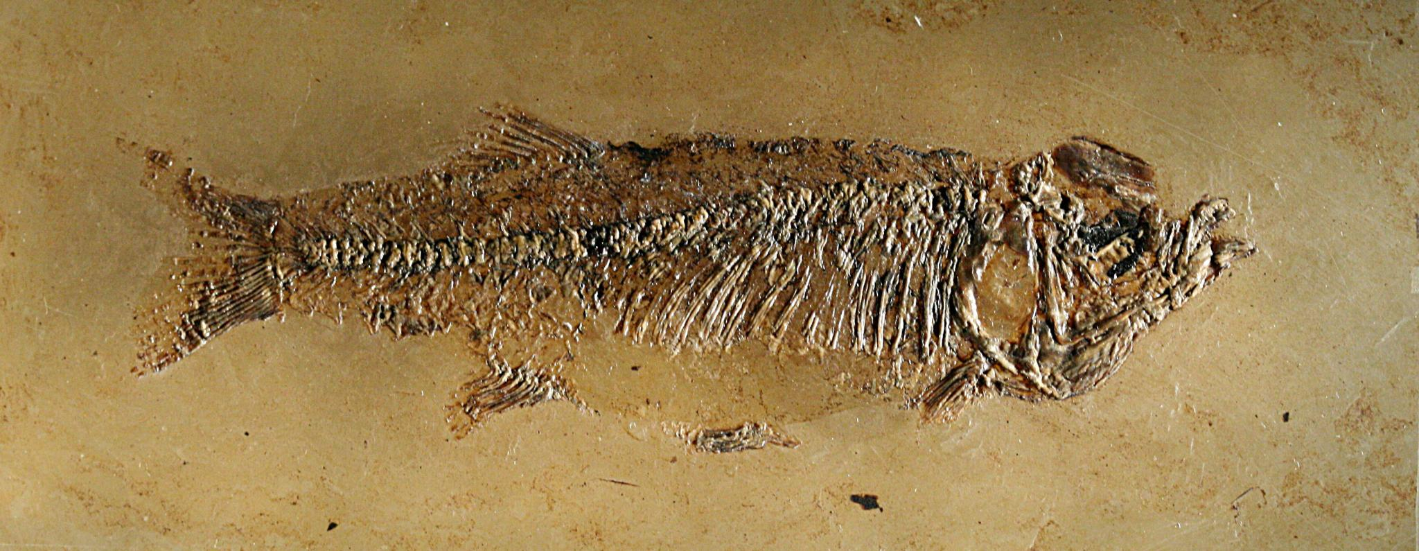 Fossiler urspr�nglicher Knochenfisch (thaumaturus intermedius). Sonderausstellung �Messel, Urpferd & Co.� im Naturhistorischen Museum Basel